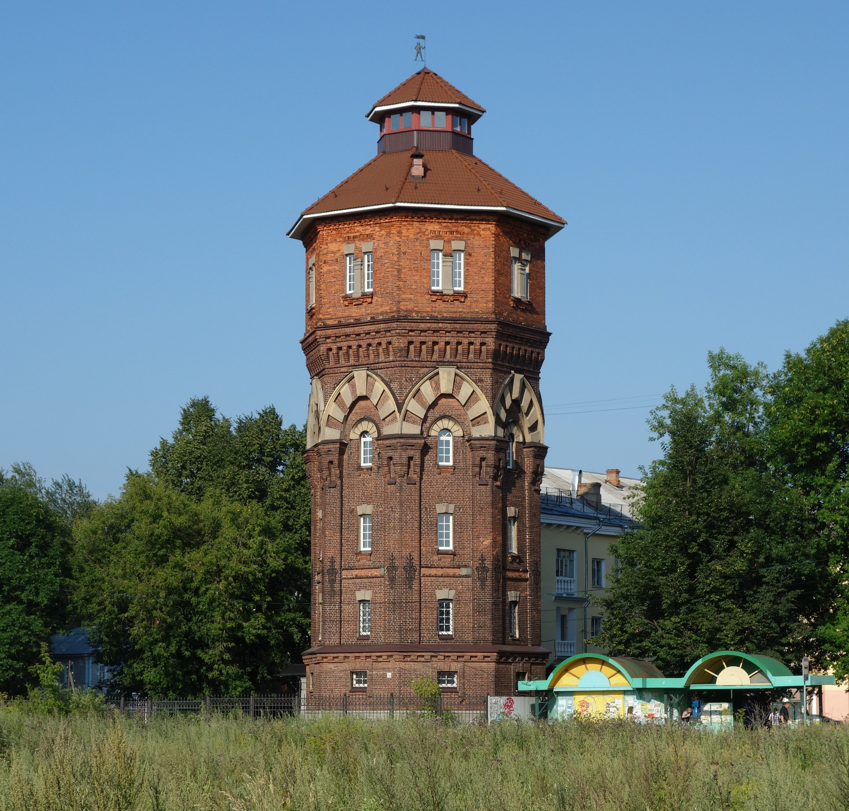 Городская водонапорная башня: улица Куйбышева, 1, Рыбинск, Ярославская область